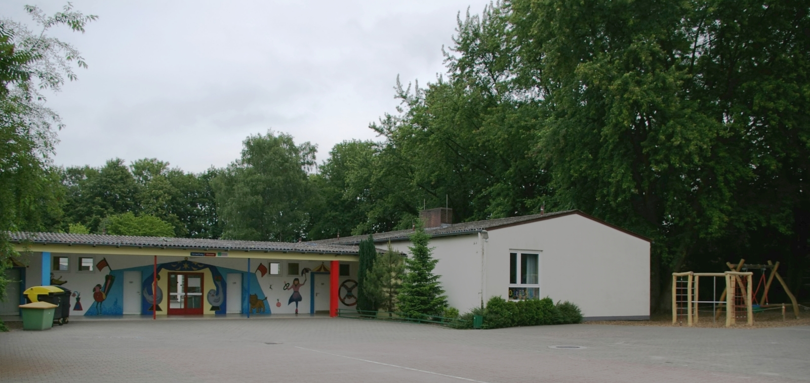 Osterfeldschule in Uelzen, Unna, Nordrhein-Westfalen